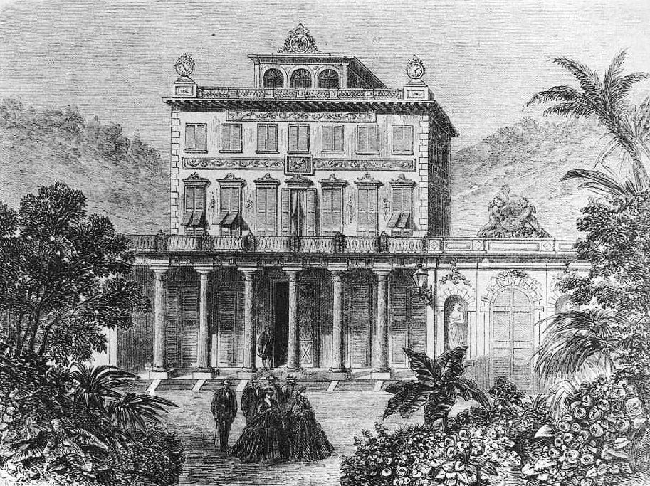 Nice - Villa Peillon - Gravure datant vers 1870